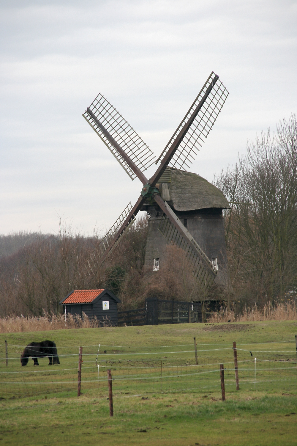 Bergen (N-H): Damlandermolen